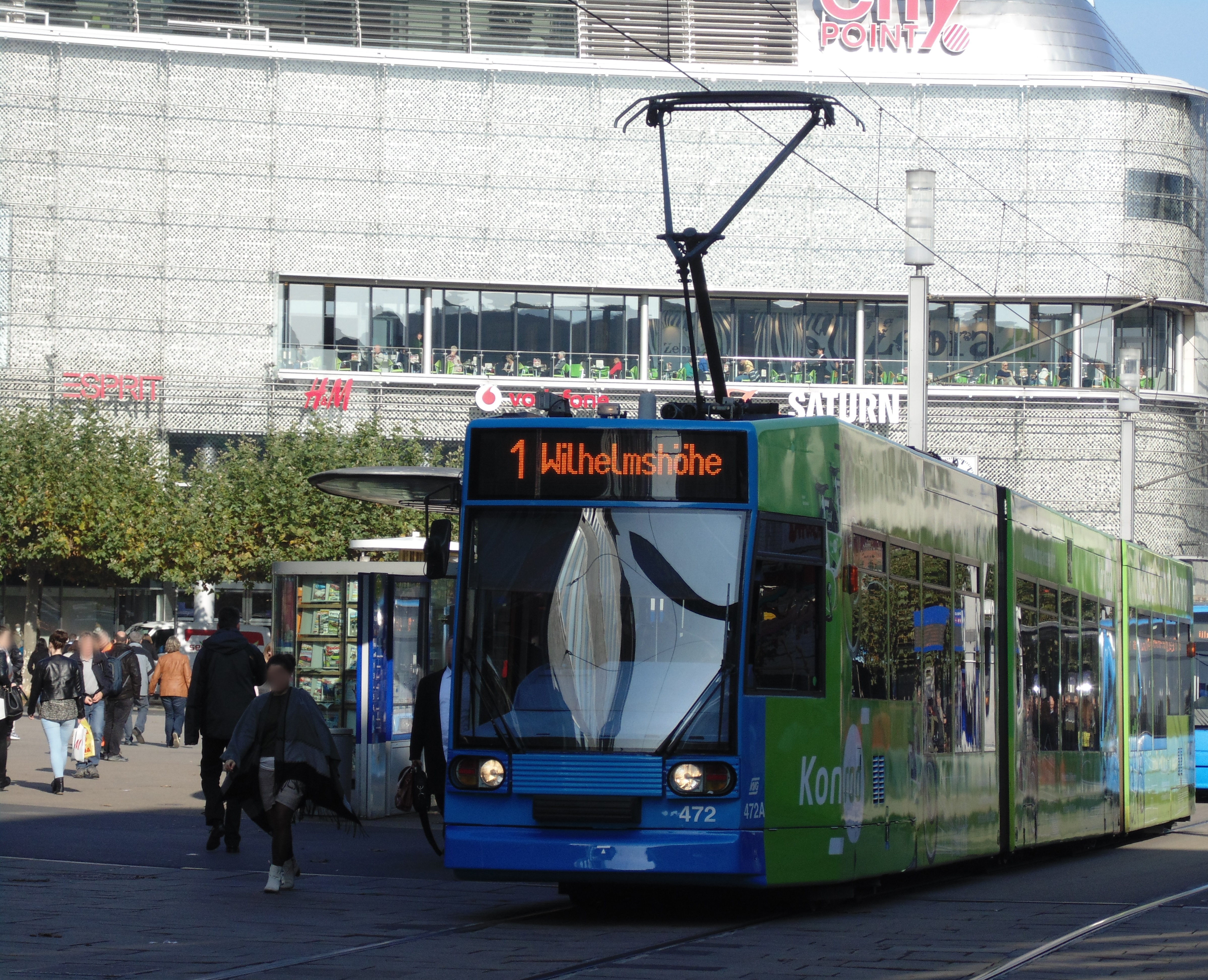 Der Triebwagen 472 der Kasseler Verkehrsgesellschaft verlässt als Linie 1 den Königsplatz in Richtung Wilhelmshöhe.